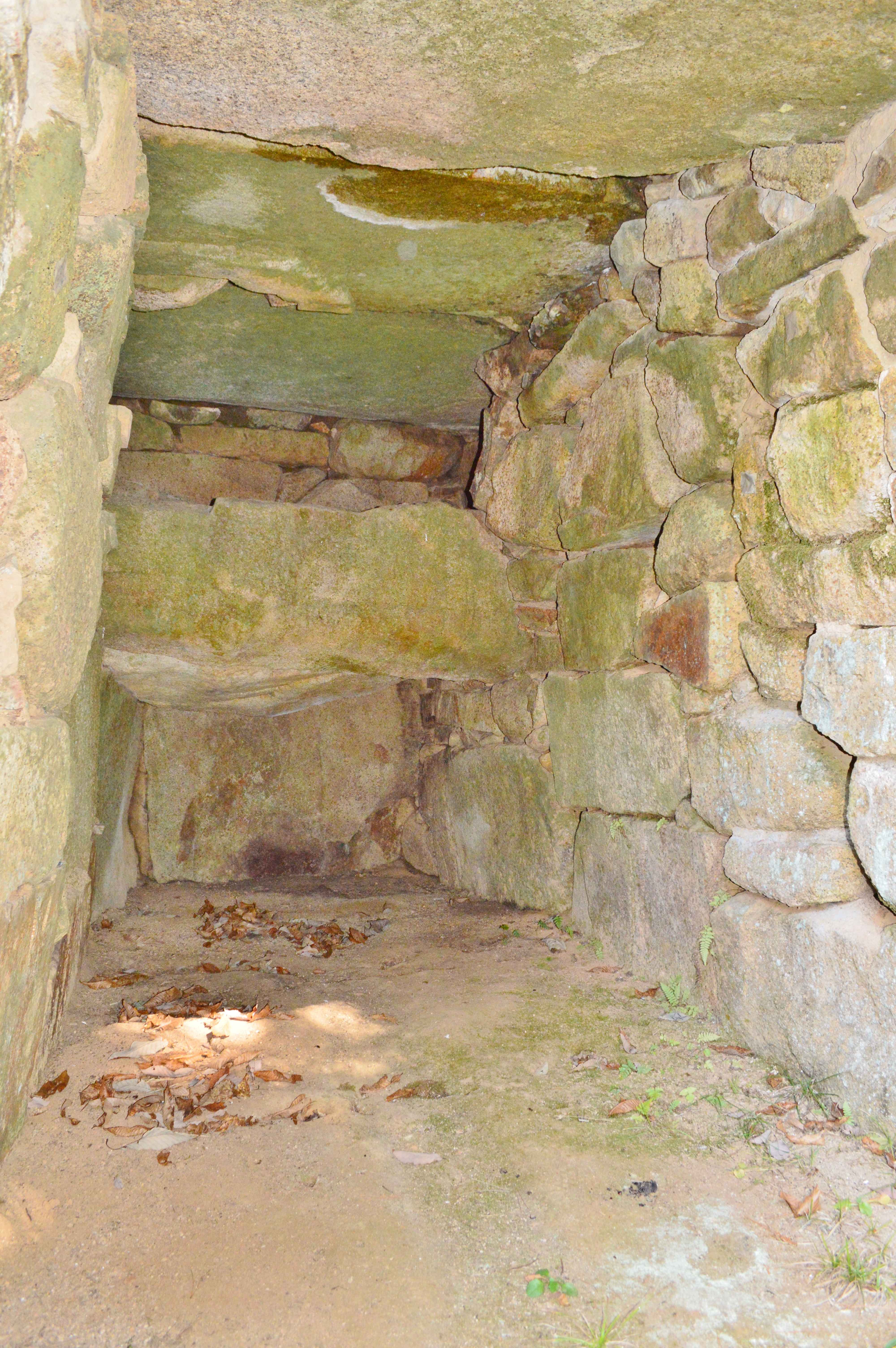 黒谷古墳 玄室奥壁 Nikon D3200